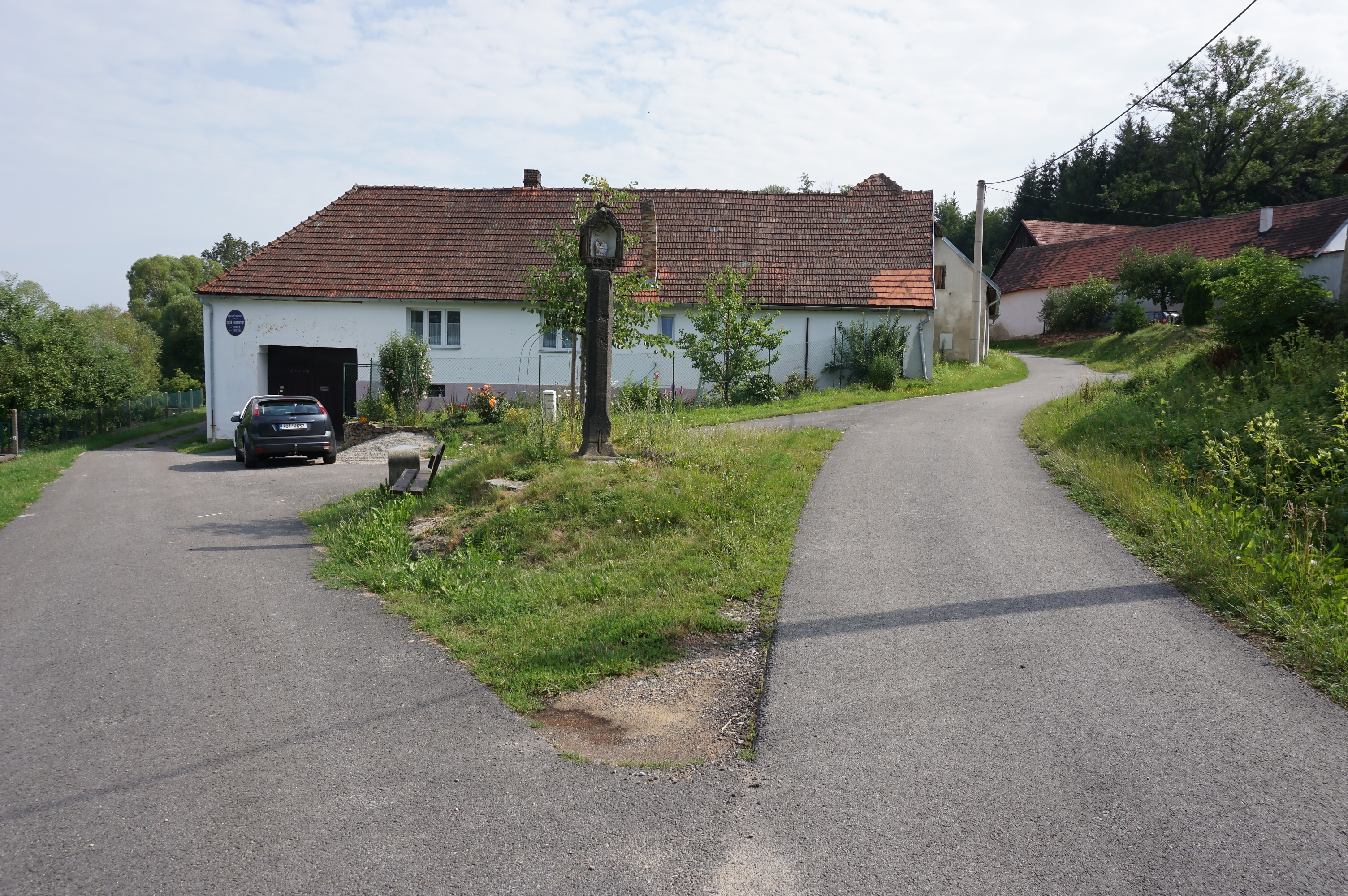 Boží muka, náves, u silnice, pp. Staré Prachatice 664/1, Městská Lhotka.